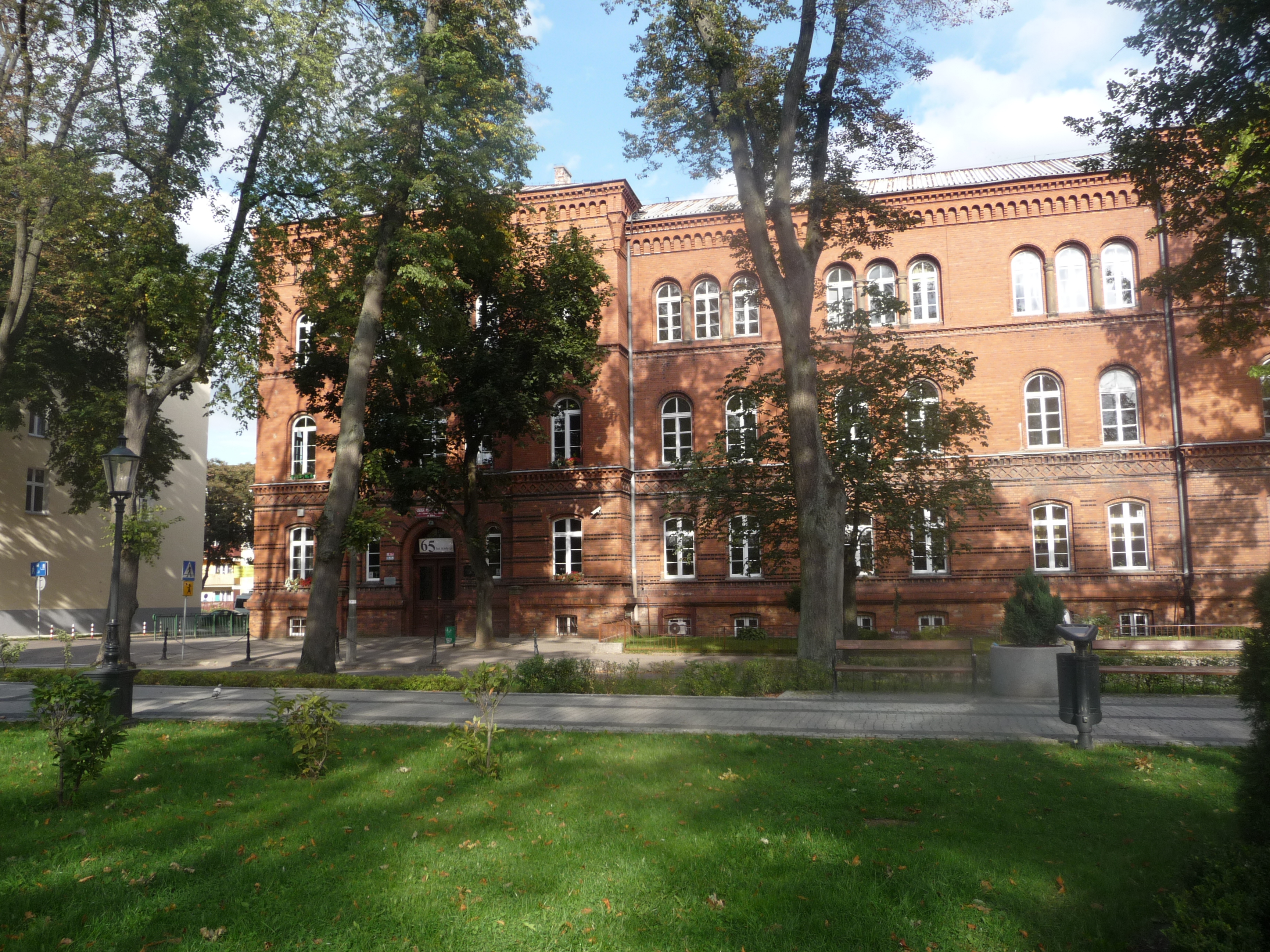 Polska